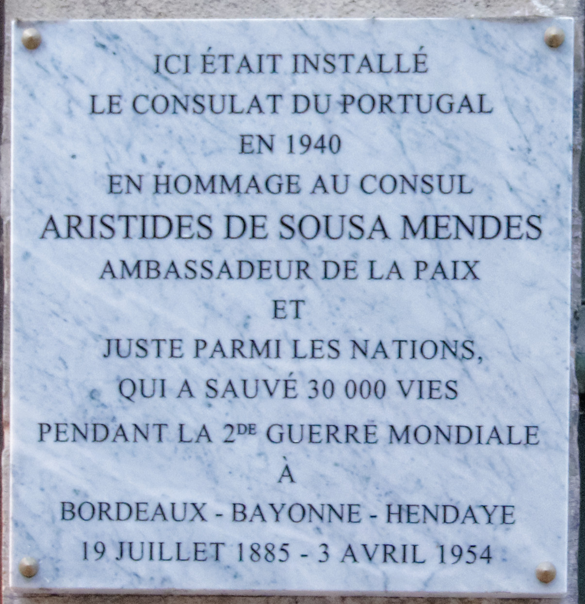 Plaque à la mémoire du consul Aristides de Sousa Mendes 8 rue du Pilori à Bayonne